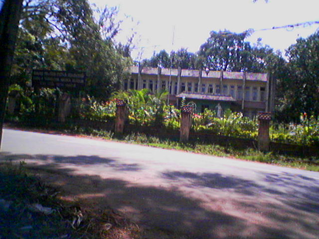 കേരള സംഗീത നാടക അക്കാദമി‌‌‌ , തൃശൂർ